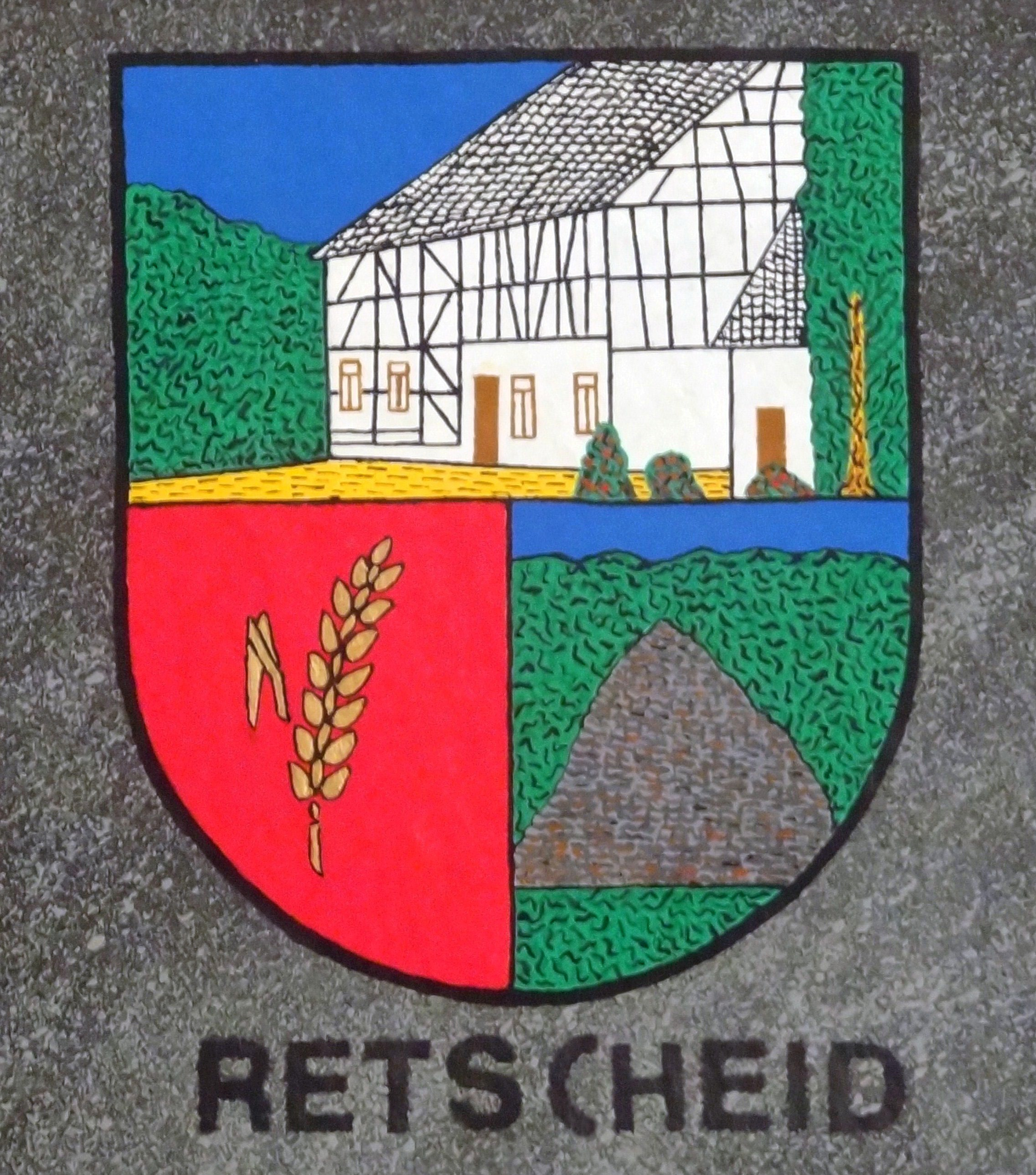 Schiefertafel als Ortswappen von Retscheid, erstellt von Richard Lenzgen